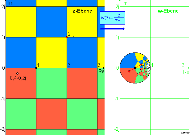 Die konforme Abbildung w(z) gleich z/z+1, die zum Smith-Diagramm führt. GFDL, gezeichnet von Honina 09:43, 27. Jun 2004 (CEST)